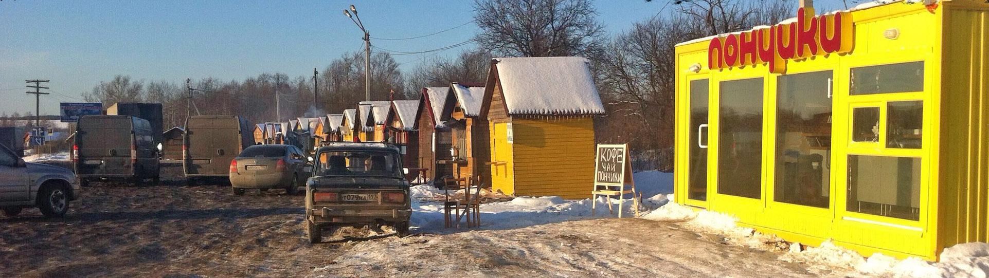 п.Крестцы Новгородской обл.: одна из больших автомобильных стоянок со множеством торговцев пирожками